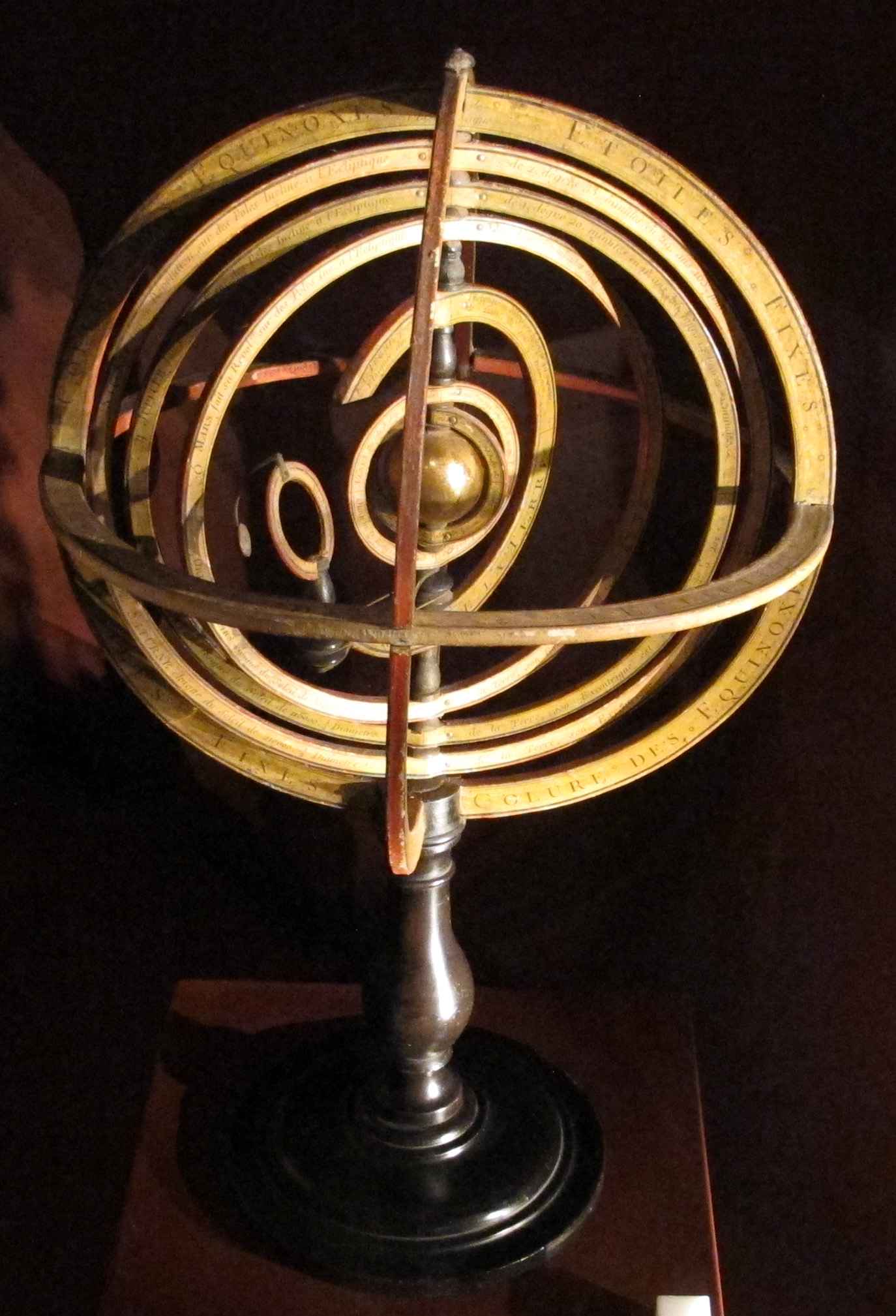 Museo Galileo, Firenze